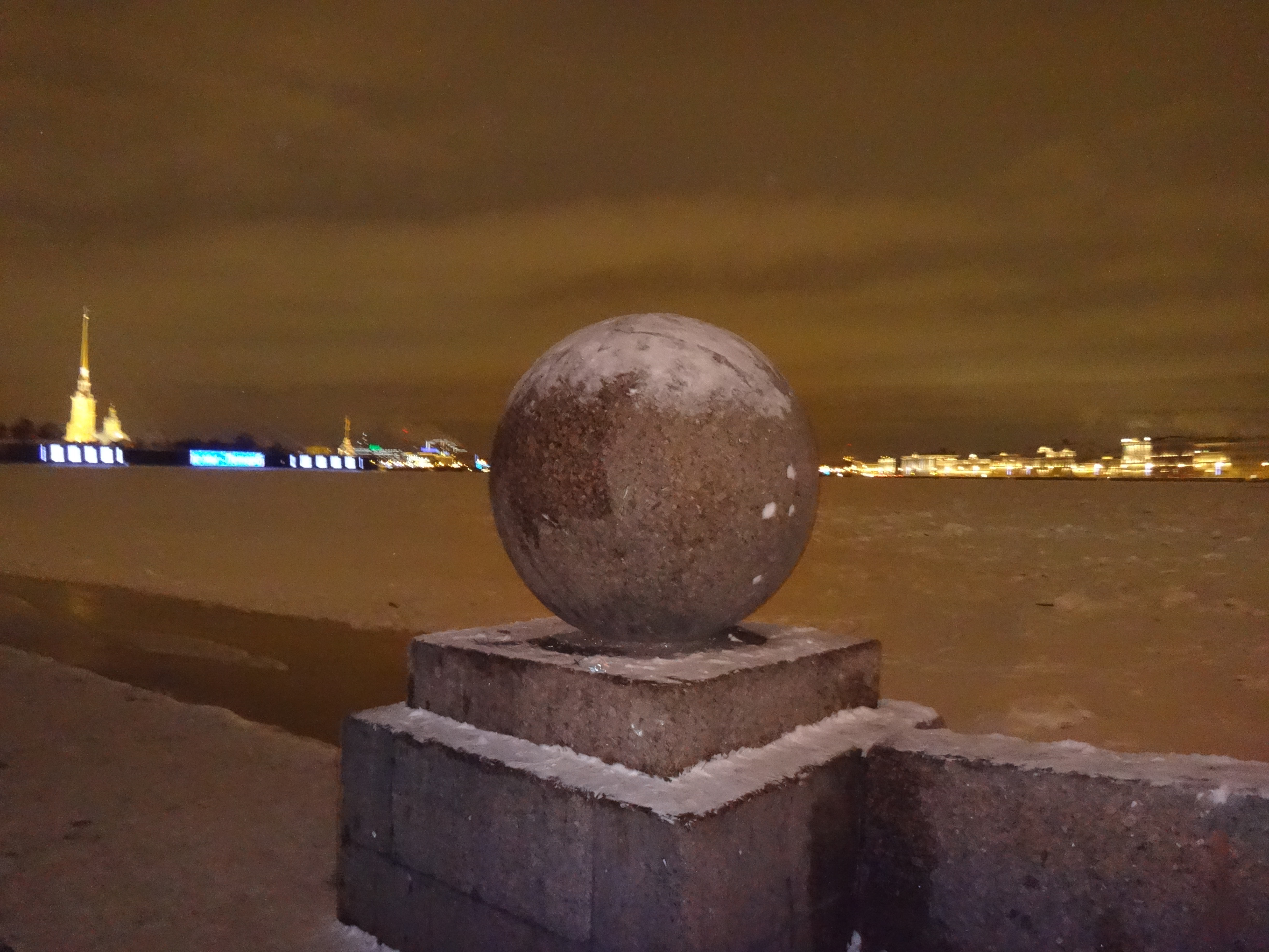 Шар Стрелки В.О.